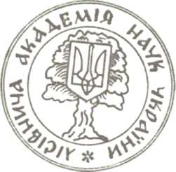 Логотип ЛАНУ: Емблема Академії являв собою напис по колу: Лісівнича Академія наук України. Всередині кола зображено дуб - символ могутності життя. Зверху на дубі розміщений малий герб України, який символізує міцність і багатство держави.